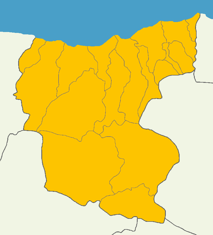 Giresun'da 2014 Türkiye cumhurbaşkanlığı seçimi sonuçları